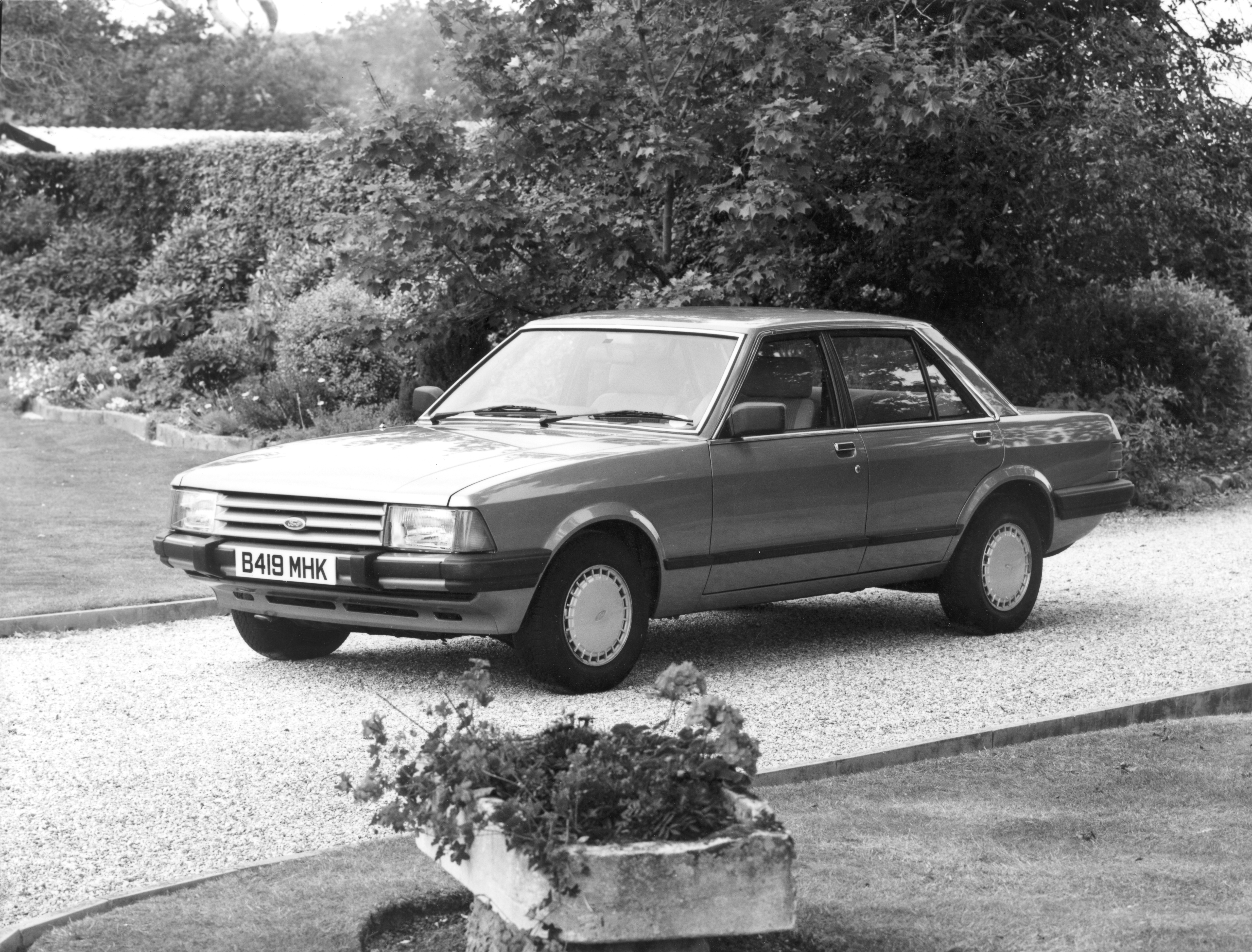 1983 Granada LX